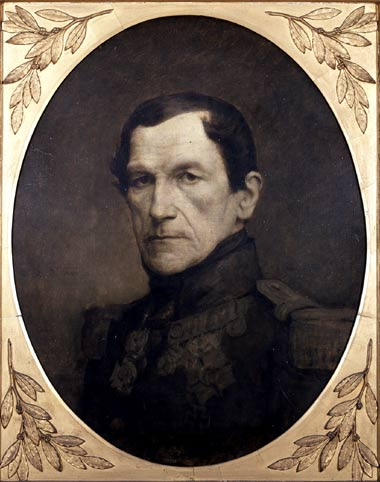 Portrait of Belgian king Leopold I